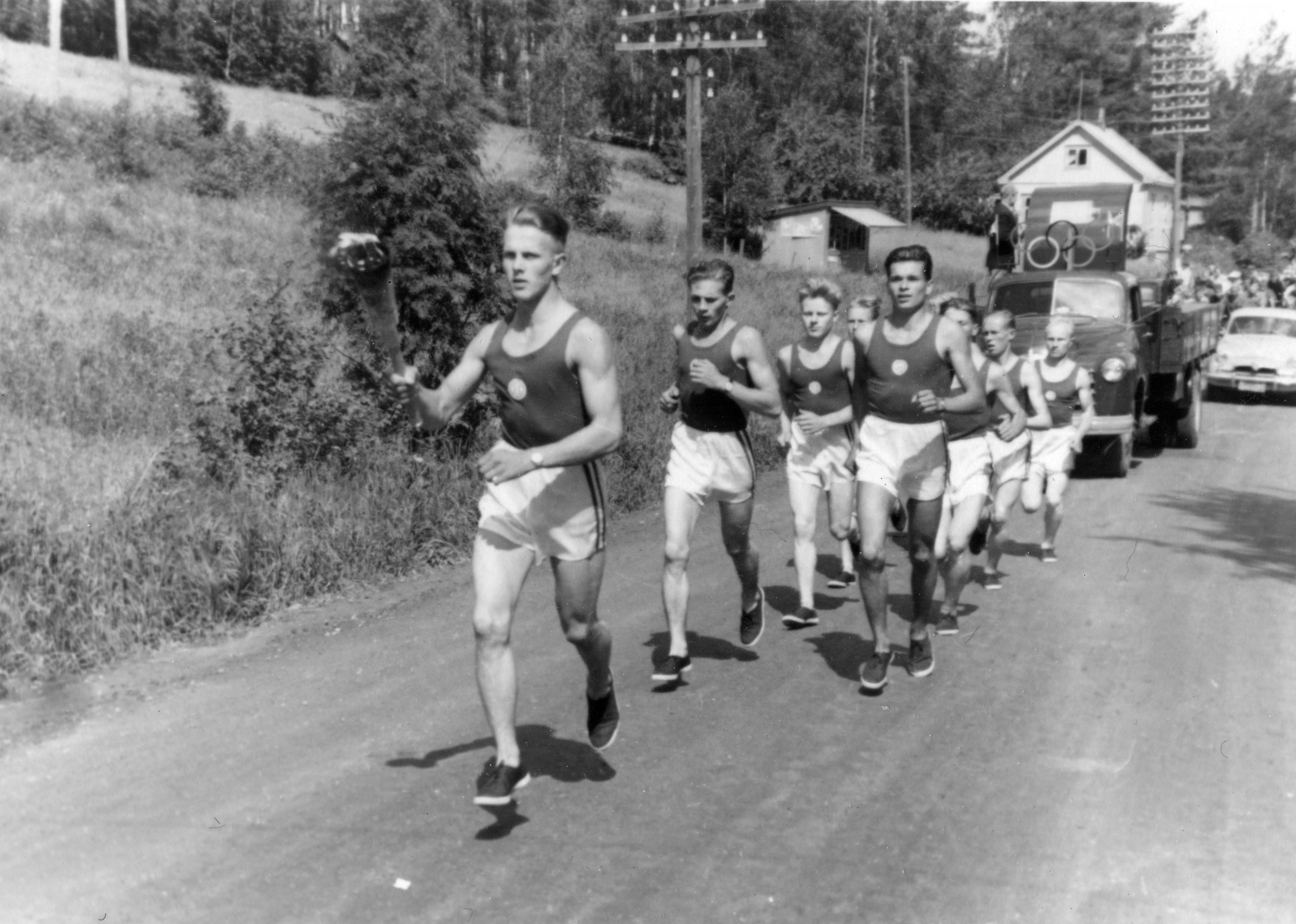 Soihtuviesti Muuramessa 15.7.1952.